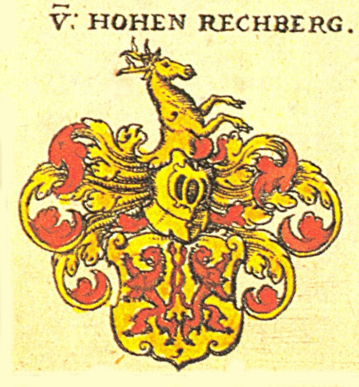 Wappen der Freiherren von Rechberg (Später Grafen von Rechberg)